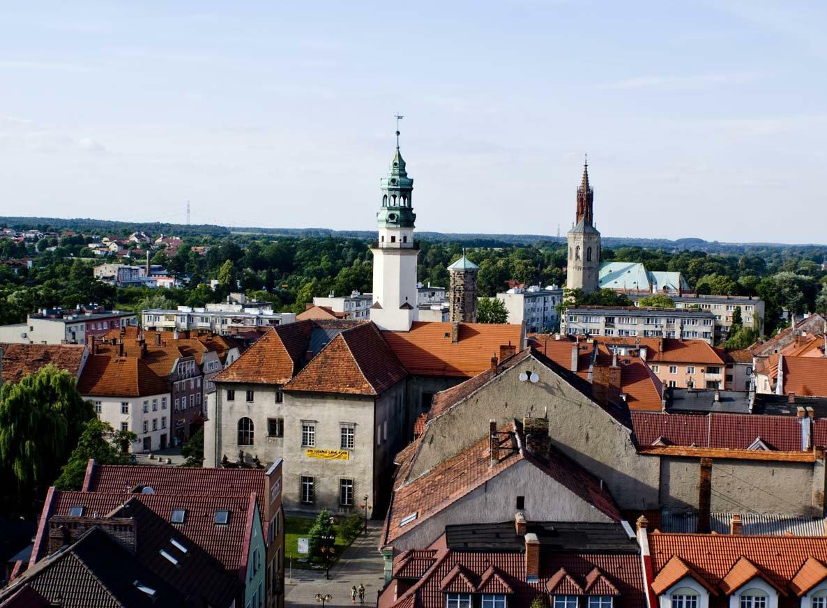 W środku zdjęcia stary ratusz z wieżą, dalej baszty Kramarska, Trynitrarska i kościoła św. Trójcy.